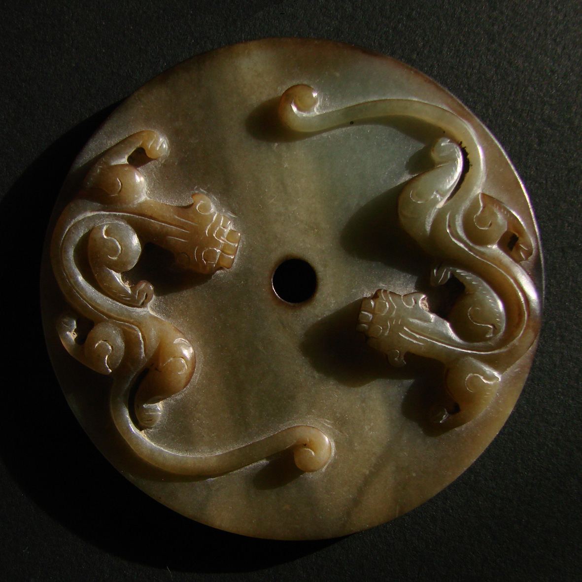 Disque en jade,époque moderne,représentant le chi (énergie vitale) sous forme de félins-dragons.